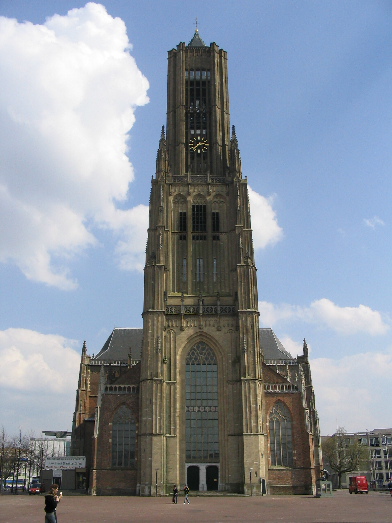 Eusebius Church in Arnhem